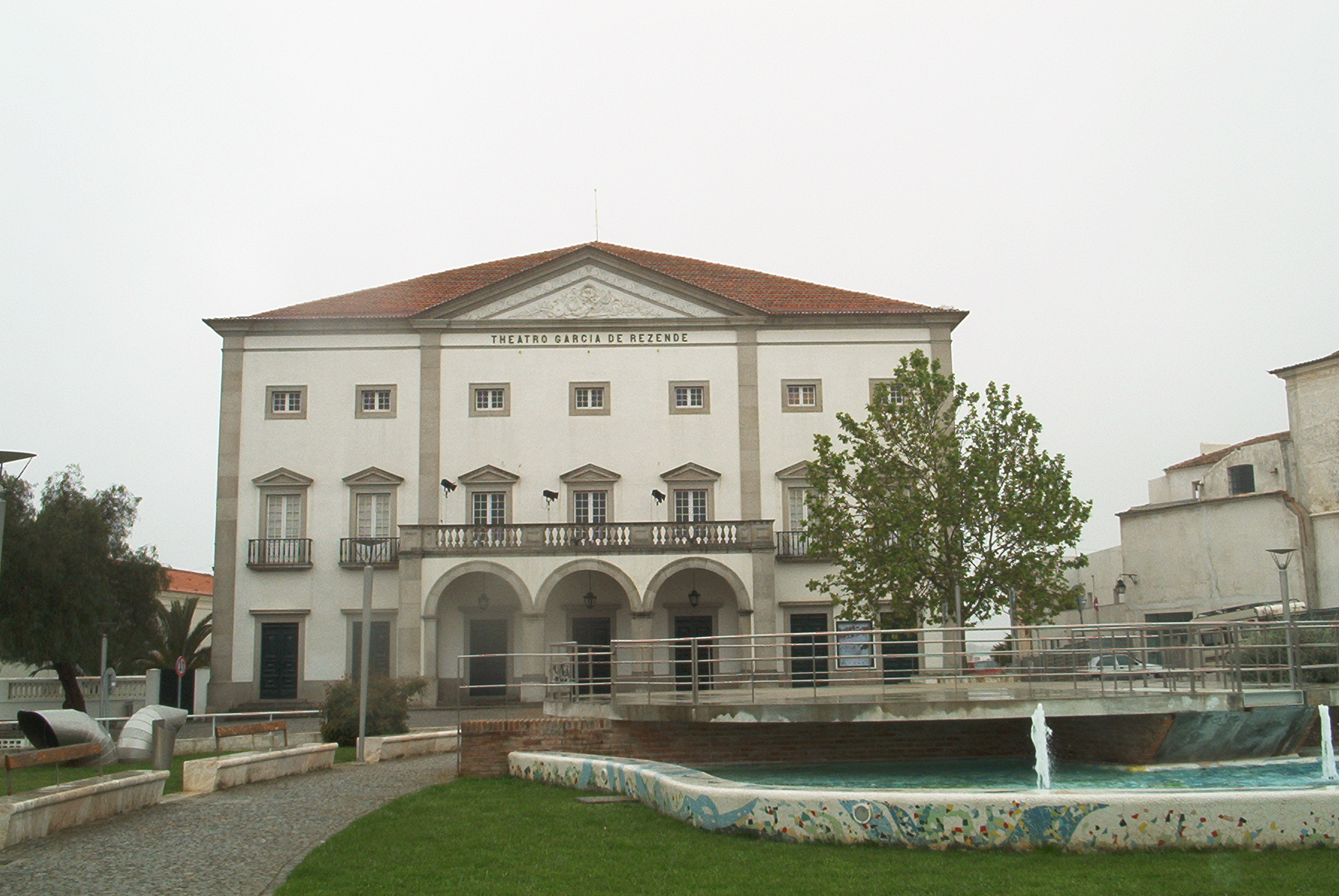 Teatro Garcia de Resende. Praça Joaquim António de Aguiar, Évora, Portugal.